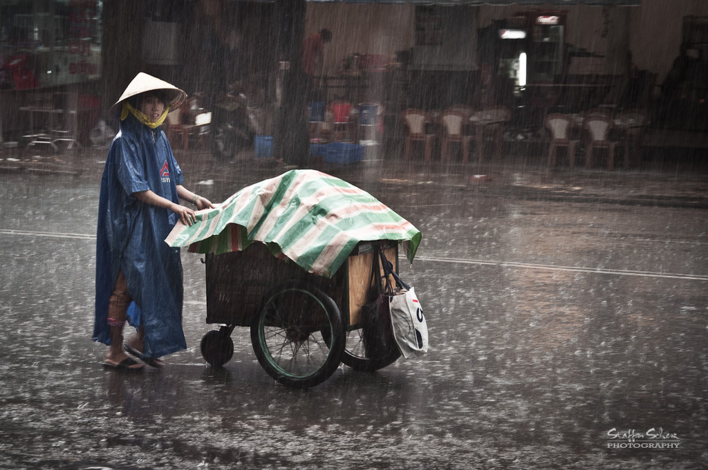 Saigon Rain